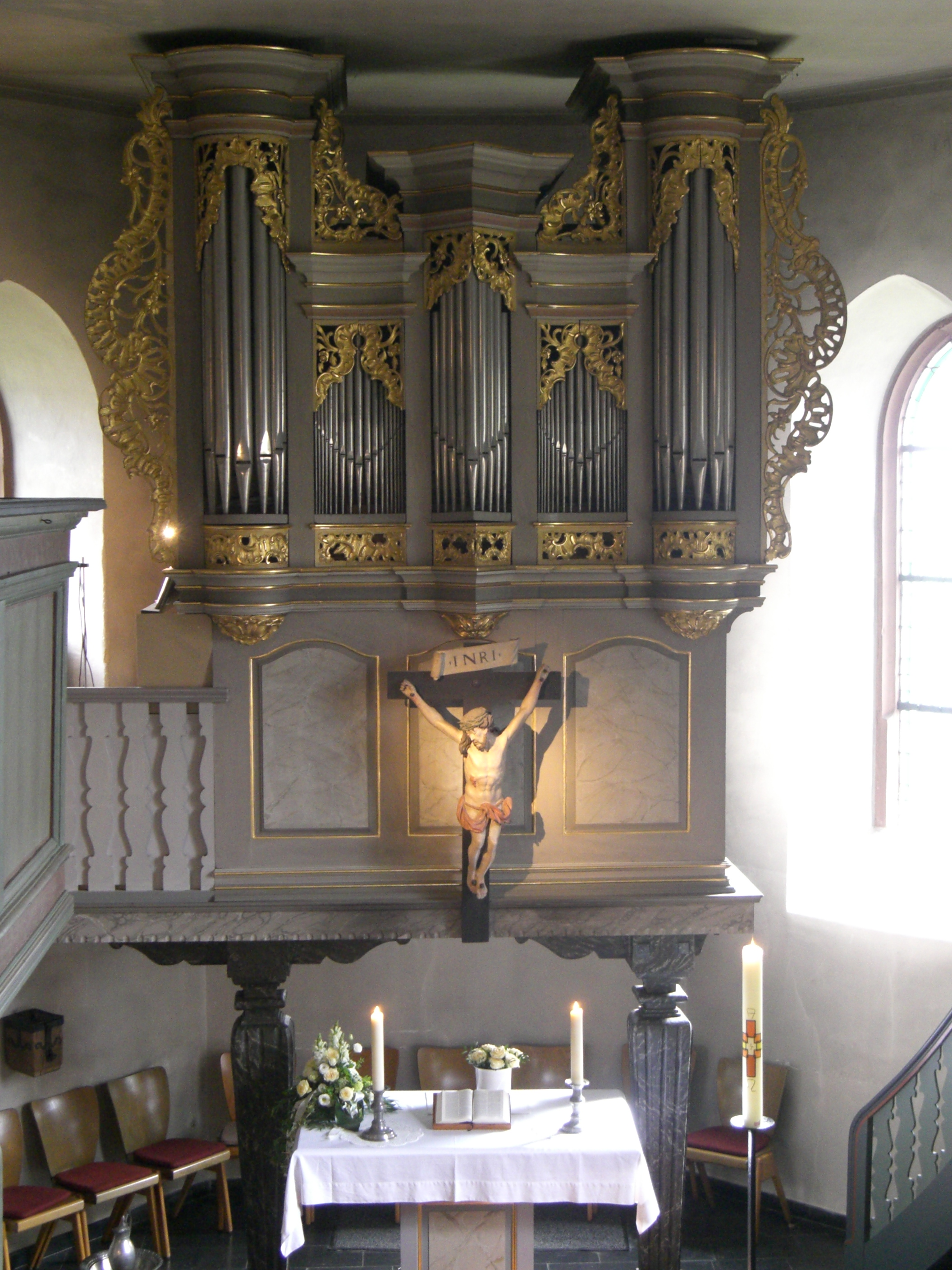 Stummorgel St. Georgskirche Steinbach Taunus gebaut 1767